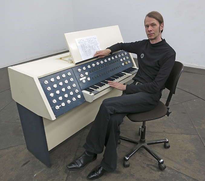 Das Subharchord ist ein elektronisches Musikinstrument, das in der DDR parallel zum Synthesizer entwickelt wurde. Die Entwicklung und Anwendung wurde 1969 aus politischen Gründen beendet und das Gerät geriet in Vergessenheit. Nach der erfolgreichen Recherche und Suche des Klangkünstlers Manfred Miersch ab 2000, konnten verschiedene Apparate wieder in Betrieb genommen und bespielt werden.